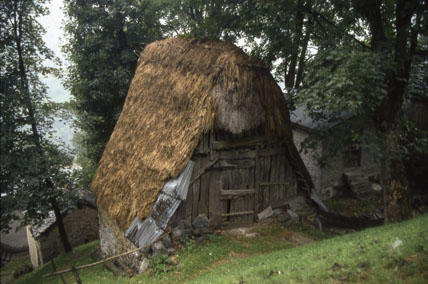 Casa con tetto di paglia. Archivio Pietro Pensa, fondo fotografico, selezione di Elvia Redaelli, 2008, n. 38.